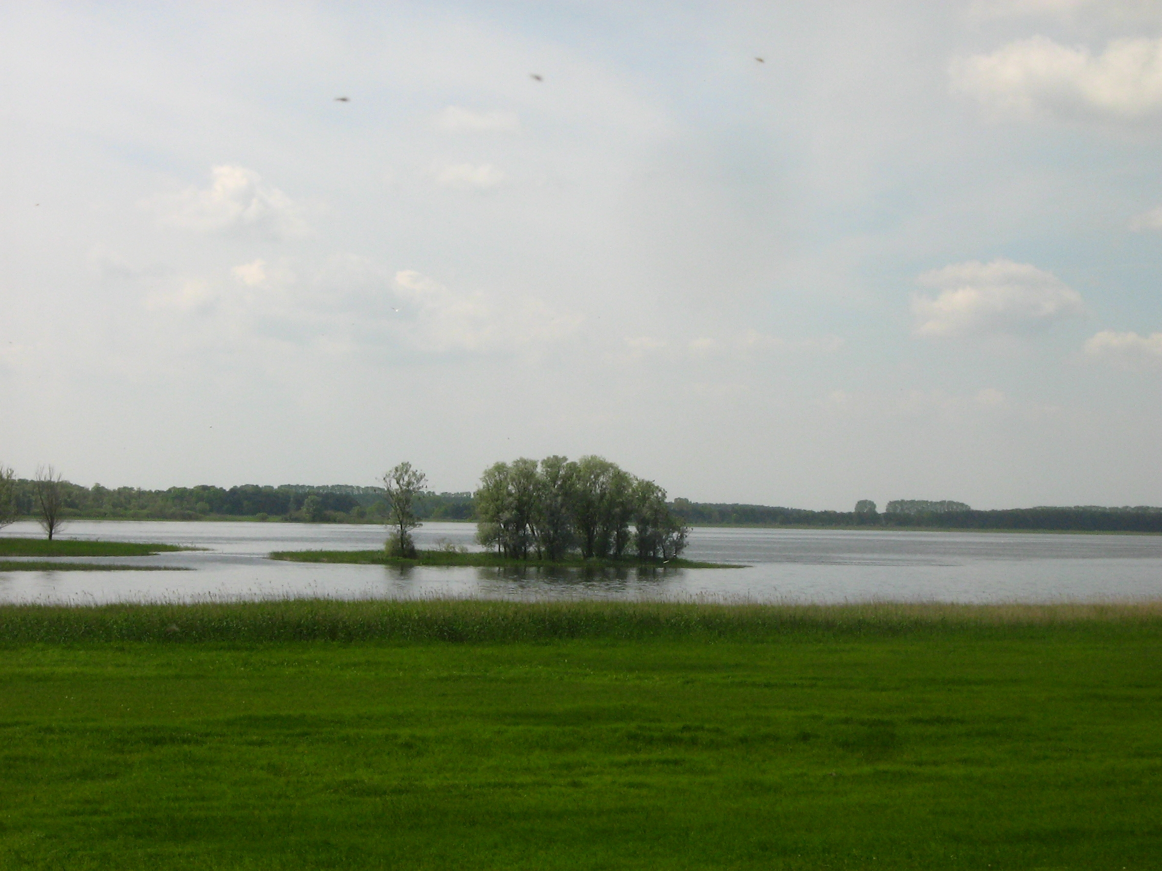 Der Gülper See in Nähe der Einmündung des Rhins.